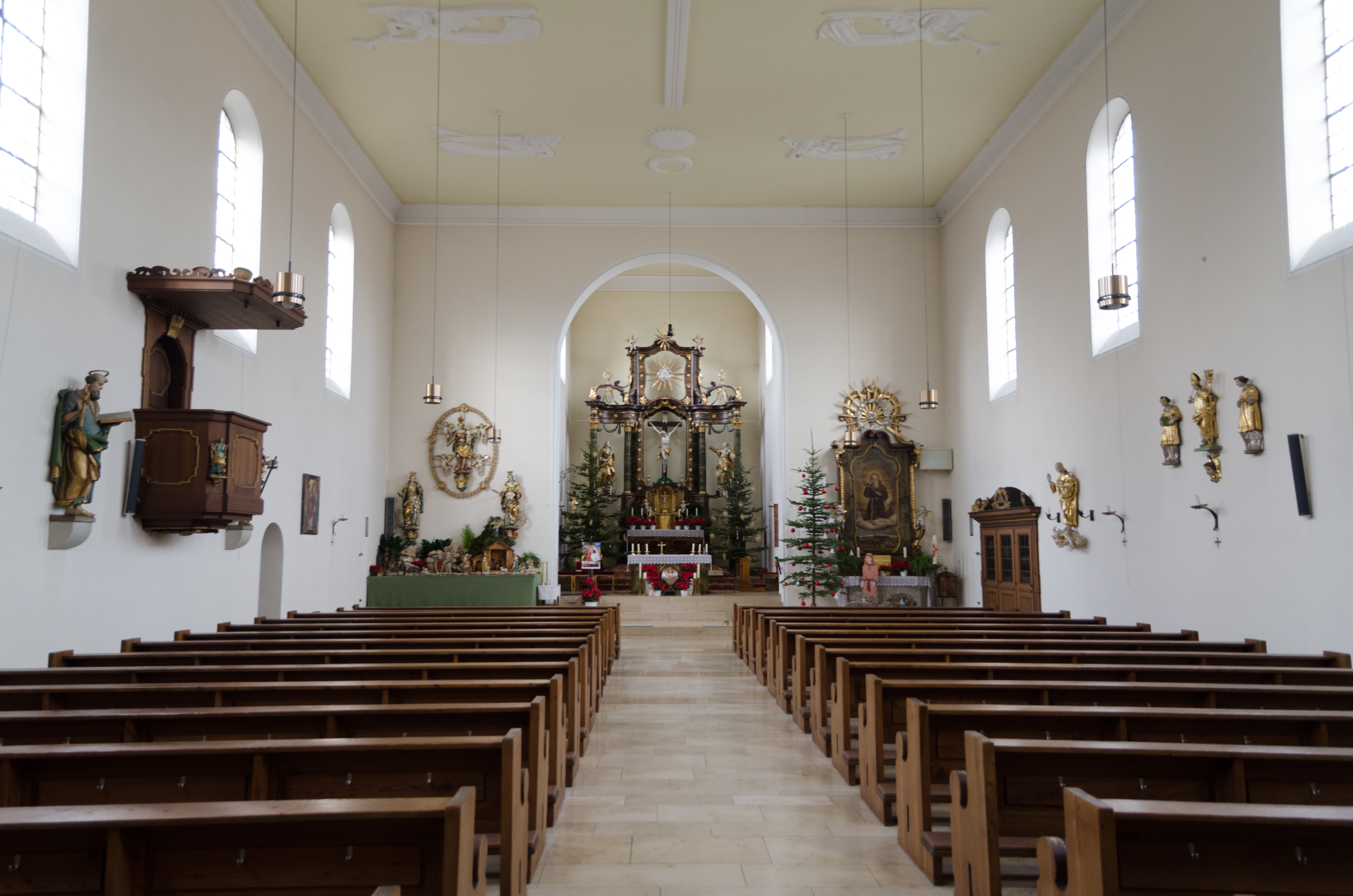 Unsleben, Kirchplatz, neue Kirche